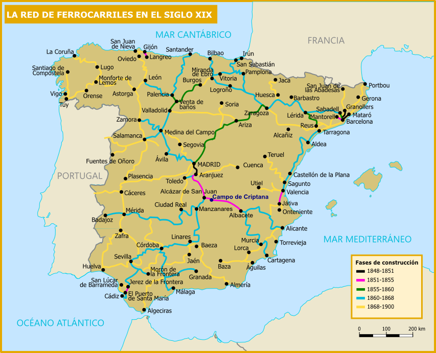 Desarrollo de la red de ferrocarriles en España. Destacada la población de Campo de Criptana